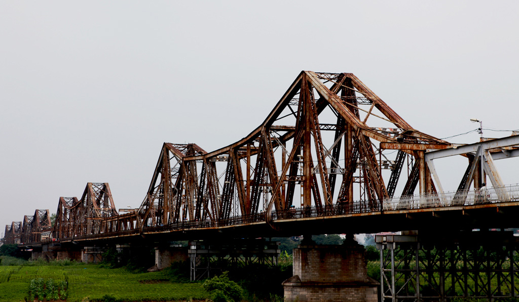 Cầu Long Biên (Doumer) là cây cầu làm từ thời Pháp do thiết kế của kiến trúc sư G.Eiffel người đã thiết kế xây dựng tháp Eiffel tại Paris thiết kế. Cầu bắc qua nhánh sông Hồng đổ vào Hà Nội, nối giữa Gia Lâm và nội thành. Ngày xưa cầu là đầu mối giao thông quan trọng còn ngày nay cầu là nơi hóng gió mát từ bãi giữa đất bồi thổi vào. Mỗi chiều về người Hà Nội lại đi qua cầu hưởng cái gió mát lạnh từ sông Hồng thổi vào lòng thành phố. Có lẽ cầu chẳng đẹp vì nó góc cạnh xù xì sắt thép nhưng ai sinh ra tại Hà Nội đều coi nó là một biểu tượng tinh thần, gắn bó trong tim.